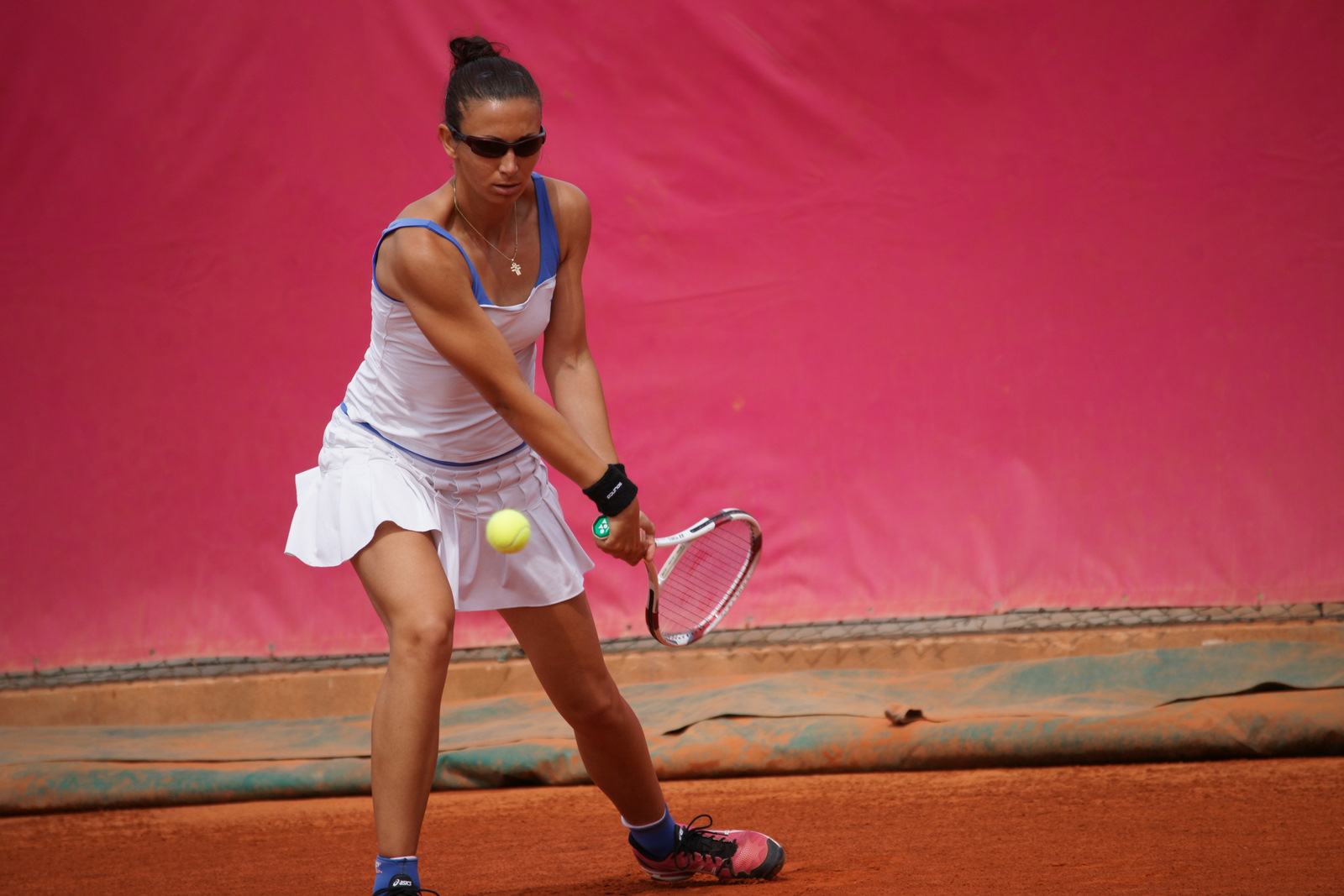 Darija Jurak, Open tennis Cagnes-sur-Mer 2012